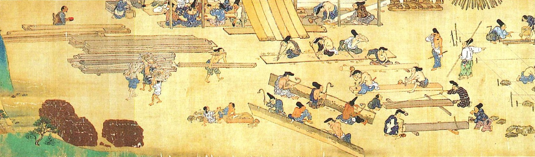 Rouleau 1 section 3 : construction du Chikurin-den, un sanctuaire dédié à la protection de la bambouseraie sacrée par le ministre Fujiwara Mitsuhiro.